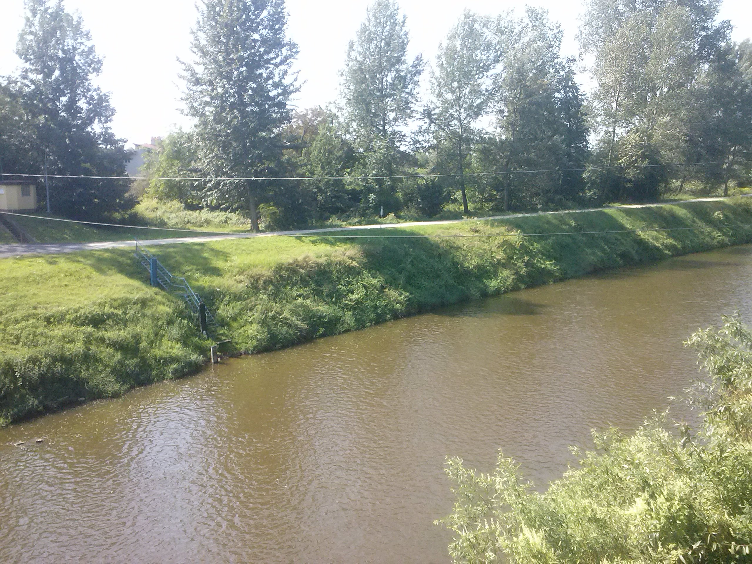 Wisłok w Tryńczy obok mostu